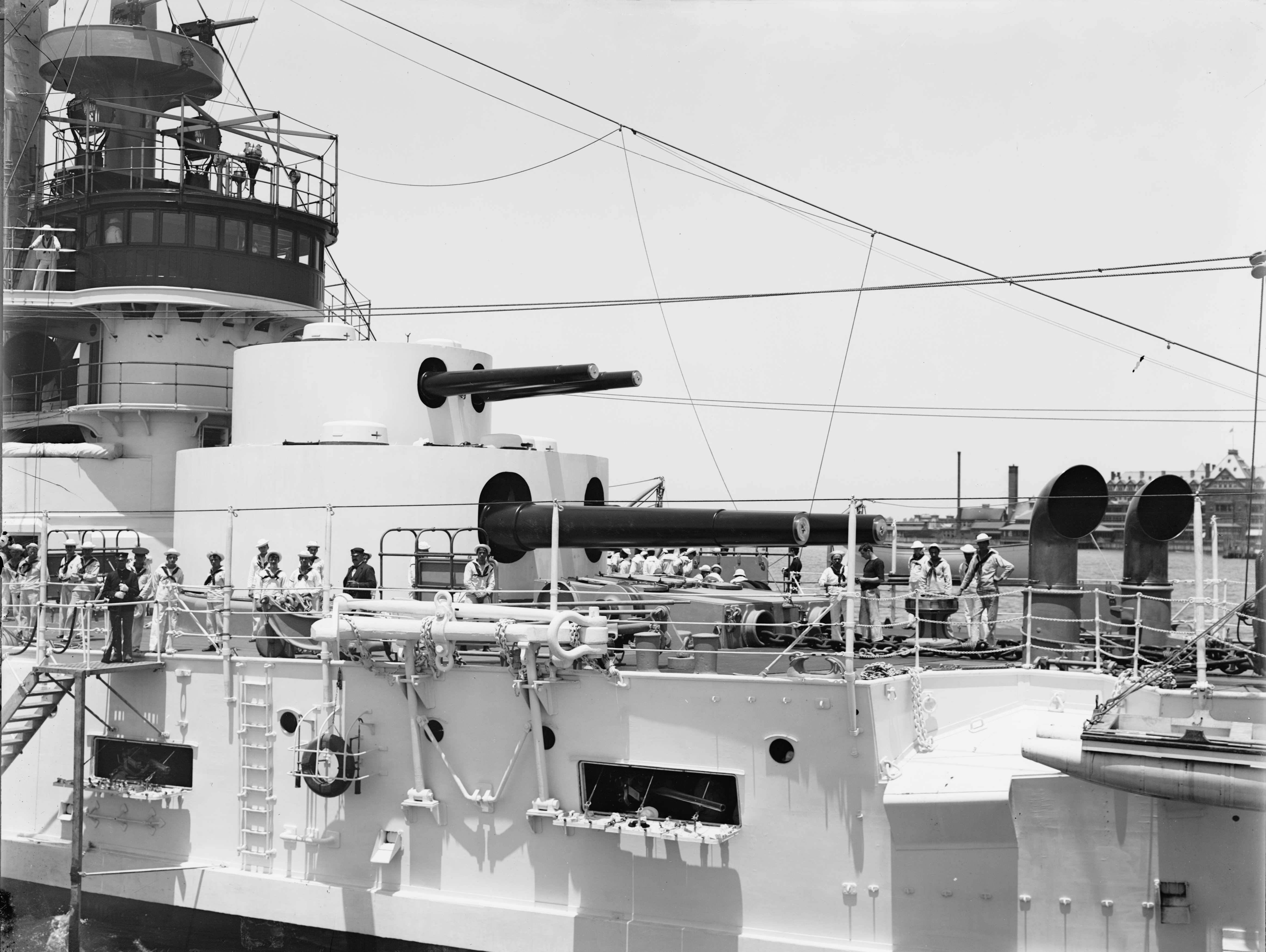 USS Kentucky (BB-6)